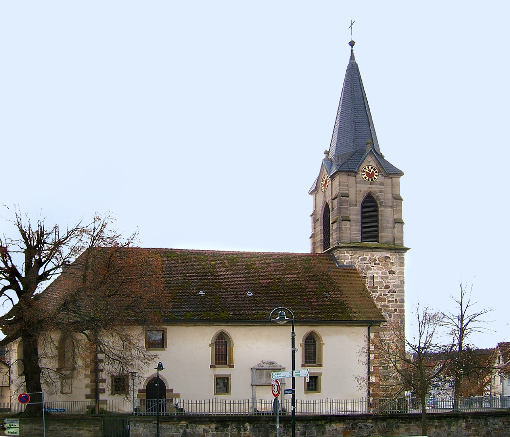 ev. Kirche in Schorndorf-Weiler, Deutschland